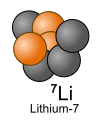 Lithium